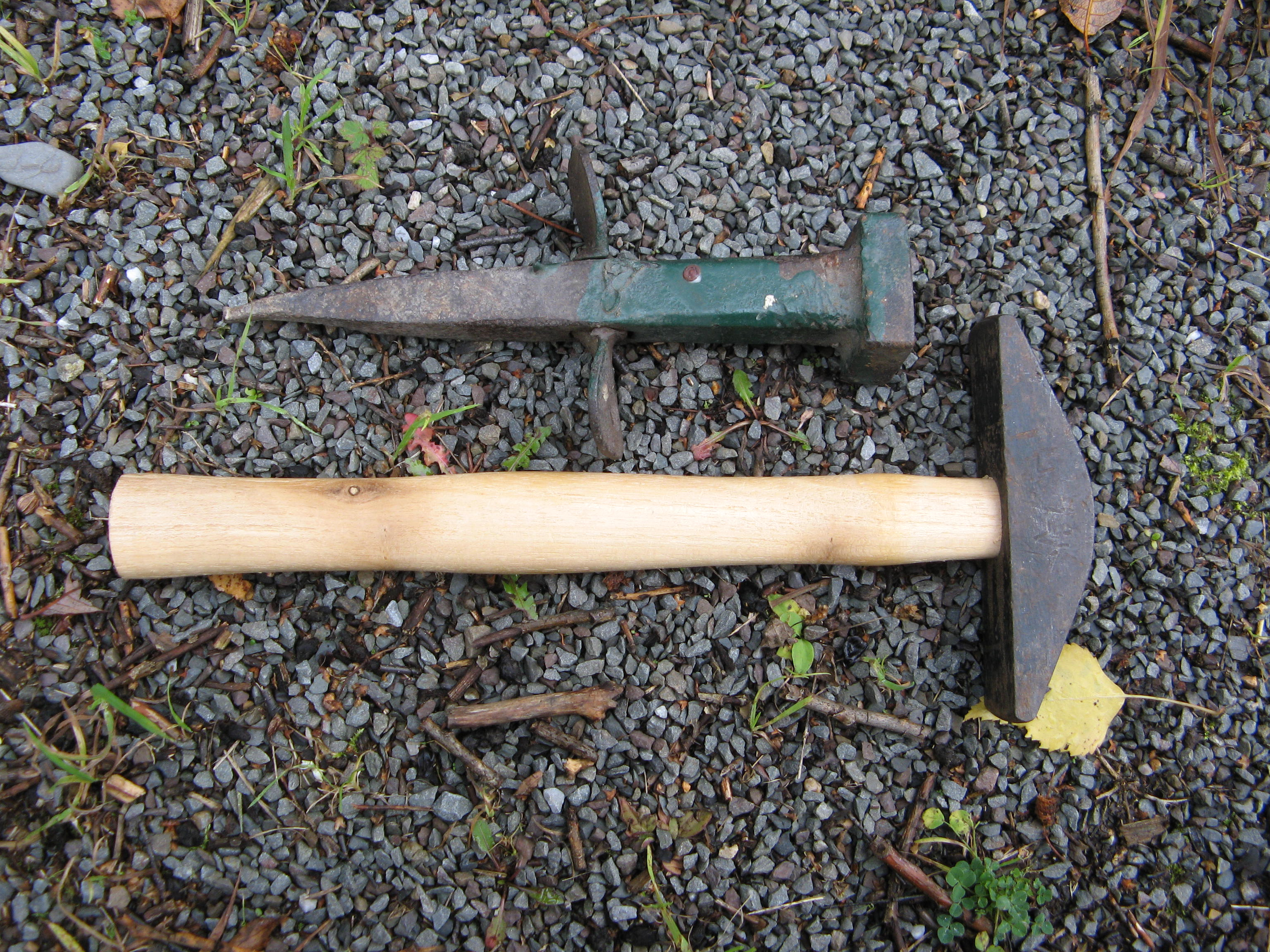 Dengelhammer